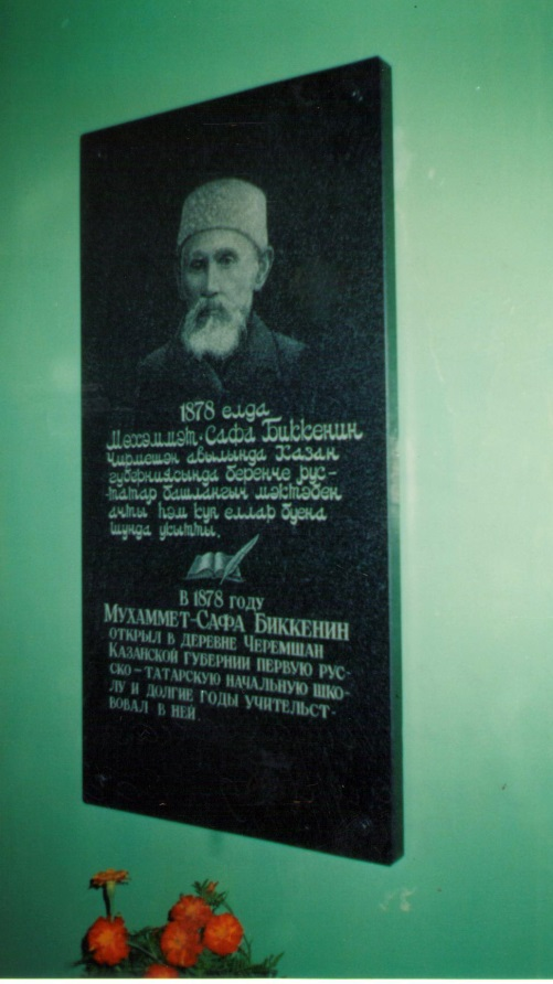 Мемориальная доска в деревне Черемшан, в здании школы, открыта в 2006 г.